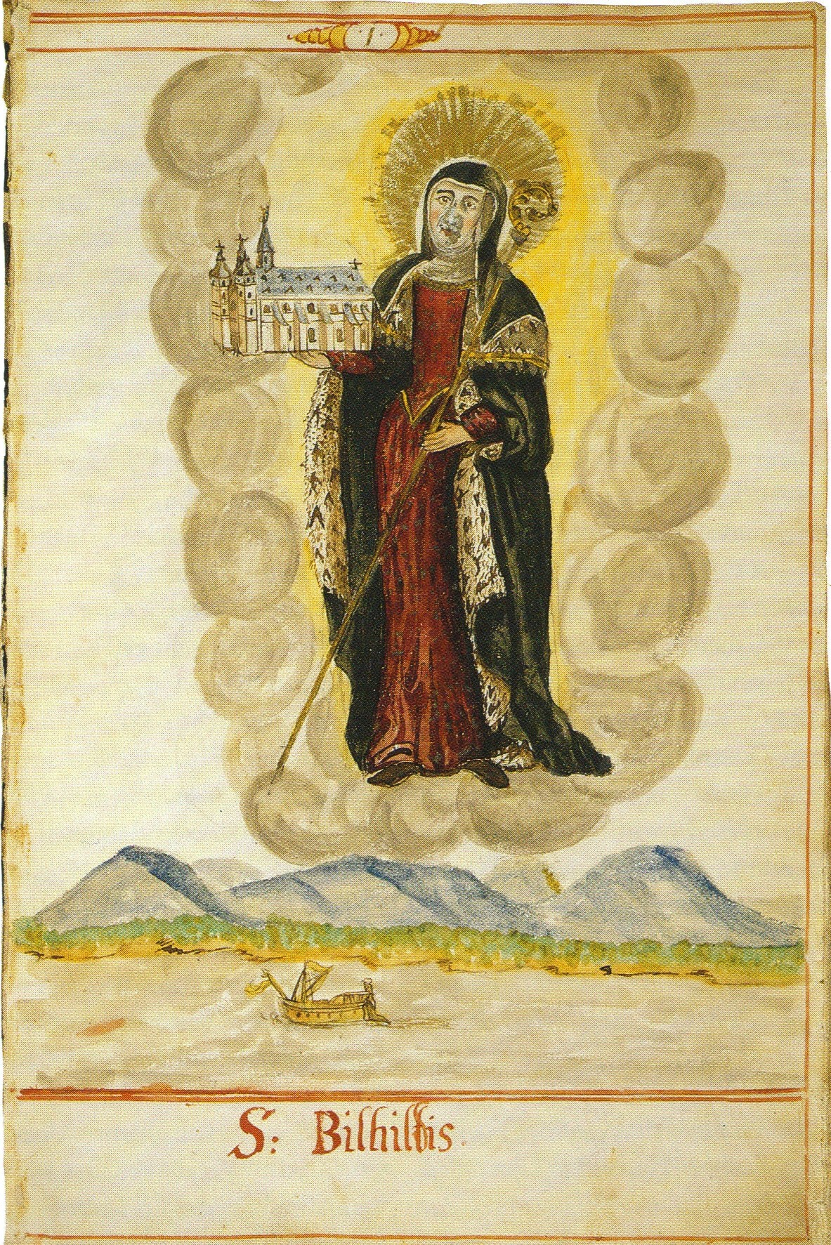 S. Bilhiltis. in: Bretzenheimer Lagerbuch, Kopie Stadtarchiv Mainz Nr. 13/58. In: 1300 Jahre Altmünsterkloster in Mainz : Abhandlungen und Ausstellungskatalog ; Ausstellung im Landesmuseum Mainz vom 28. November 1993 bis 27. Februar 1994 / hrsg. im Auftr. des Landesmuseums Mainz ... von Ingrid Adam und Horst Reber. Mit Beitr. von I. Adam. Mainz : Landesmuseum, 1993